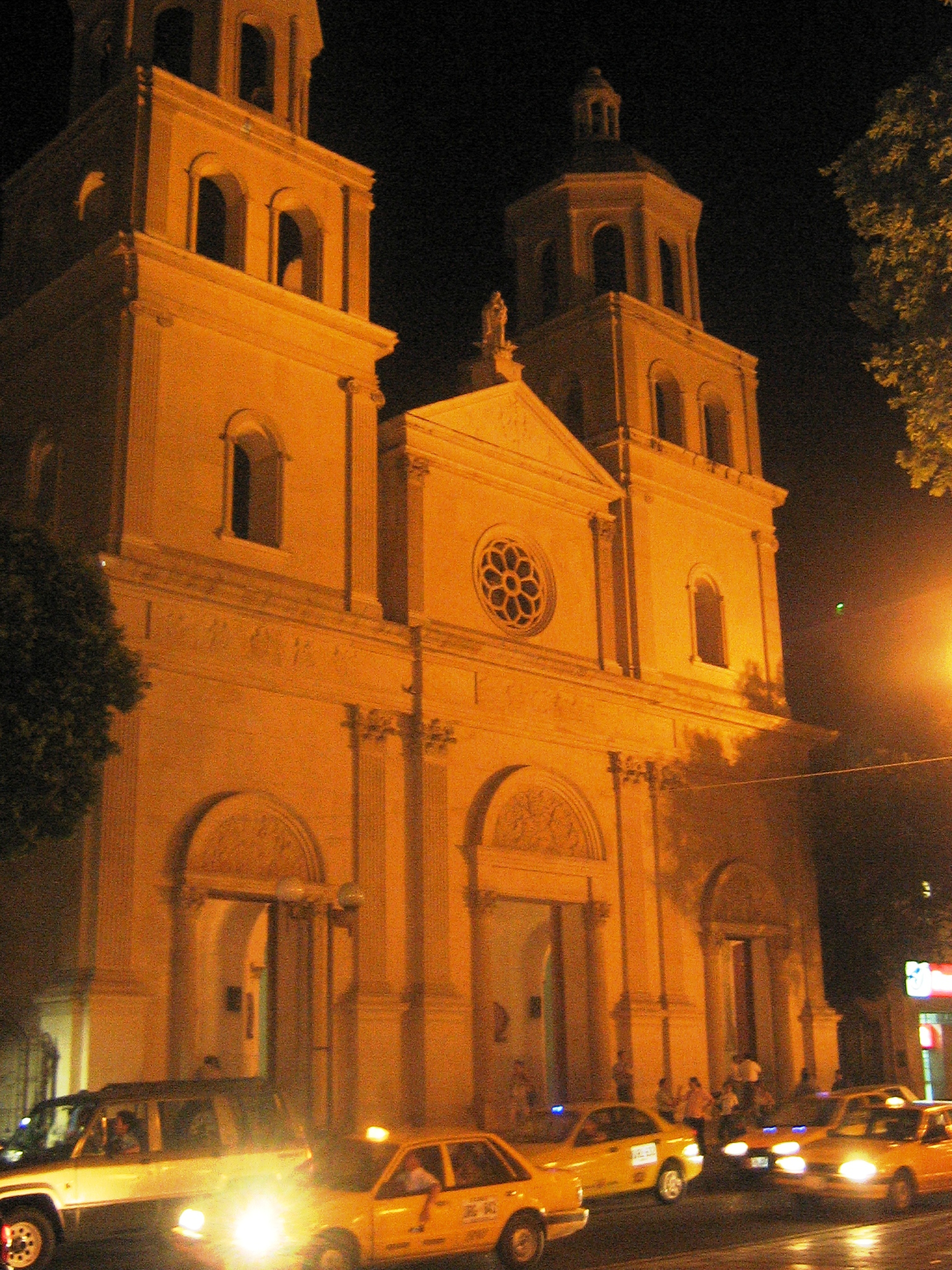 Catedral de Cúcuta